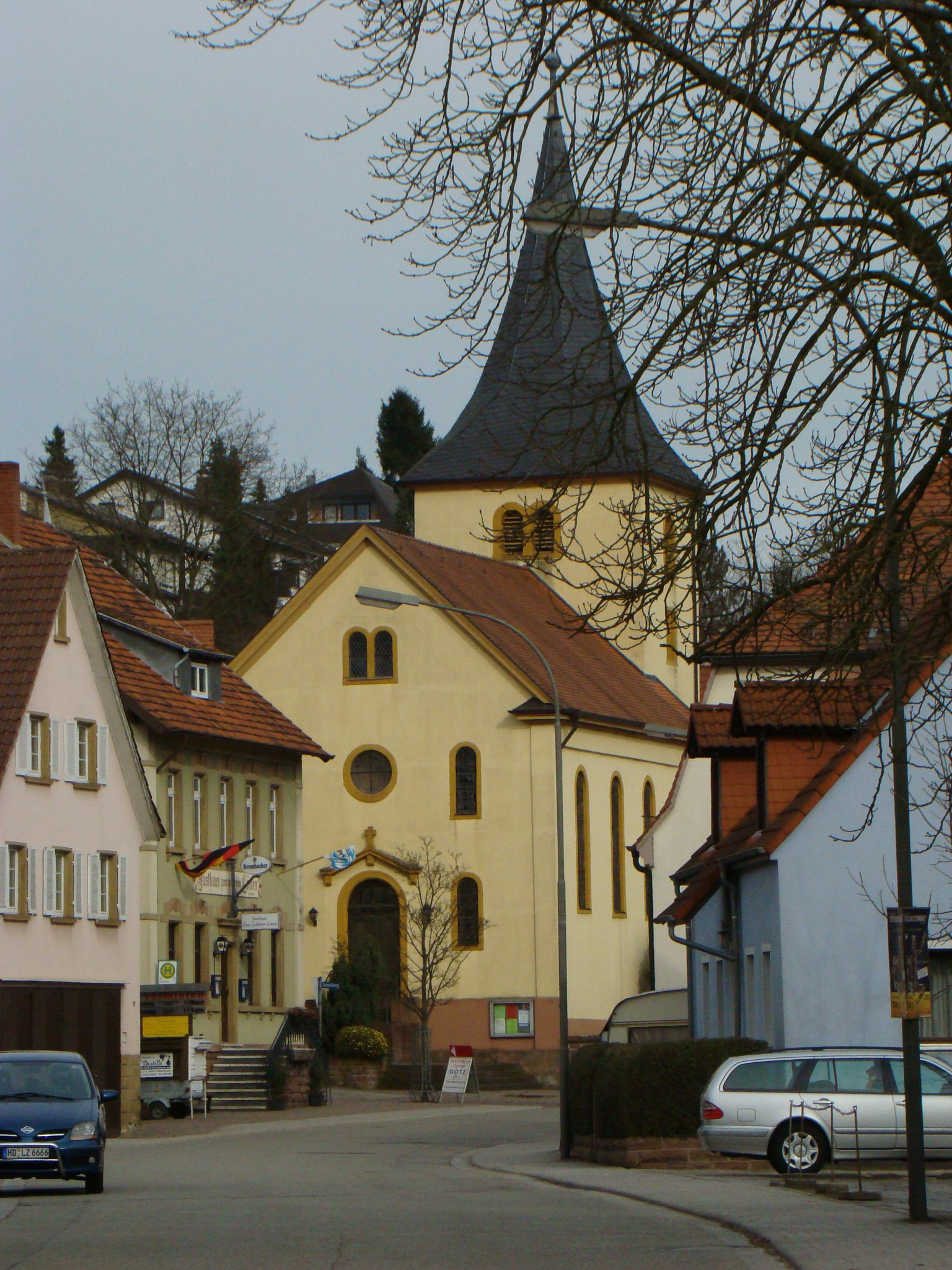 Evangelische Kirche in Wiesenbach / Baden